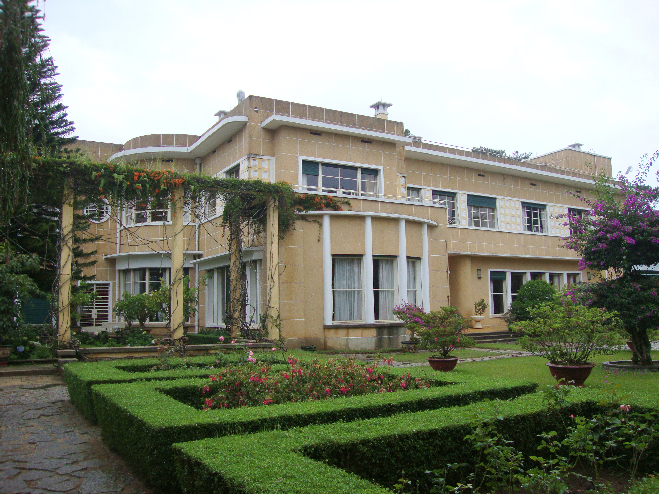 Dinh Bảo Đại (Dinh III), Thành phố Đà Lạt